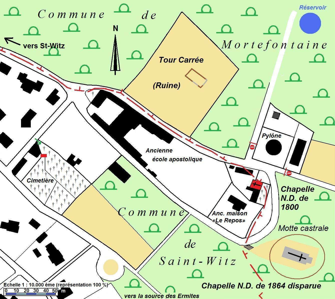 Plan de situation des éléments du patrimoine sur la butte de Montmélian, à Saint-Witz (95) et Mortefontaine (60).